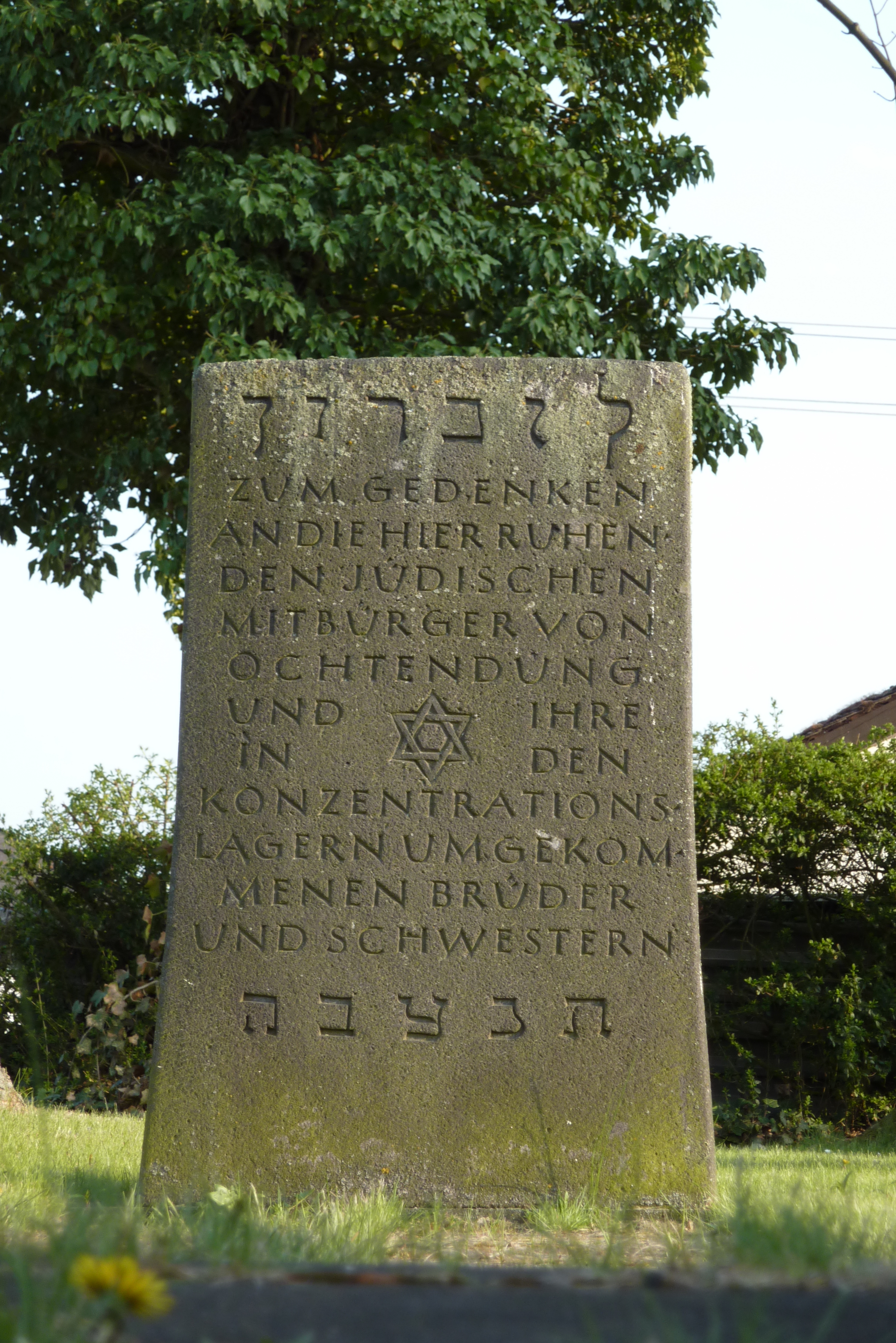 Gedenkstein auf dem jüdischen Friedhof in Ochtendung (vgl. Gedenkbuch des Bundesarchivs [1])